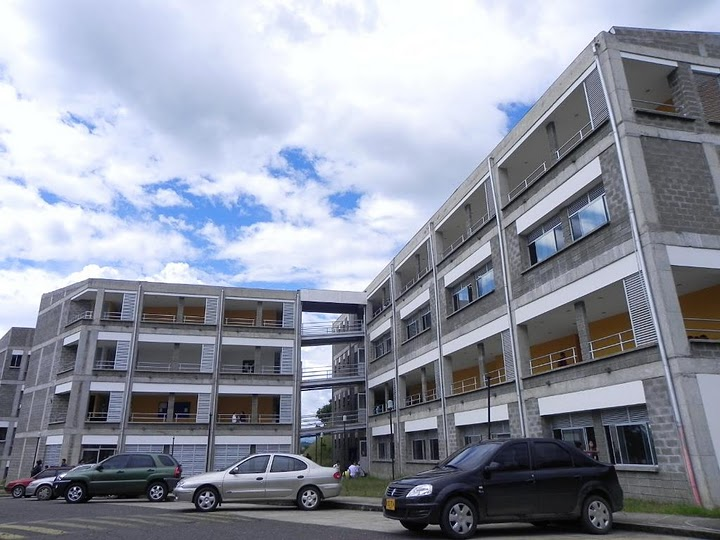 La Facultad de Ciencias Naturales, Exactas y de la Educación desarrolla y aplica el saber pedagógico para la formación y capacitación de docentes, el mejoramiento de la educación, la enseñanza, el aprendizaje y la transformación de la sociedad.